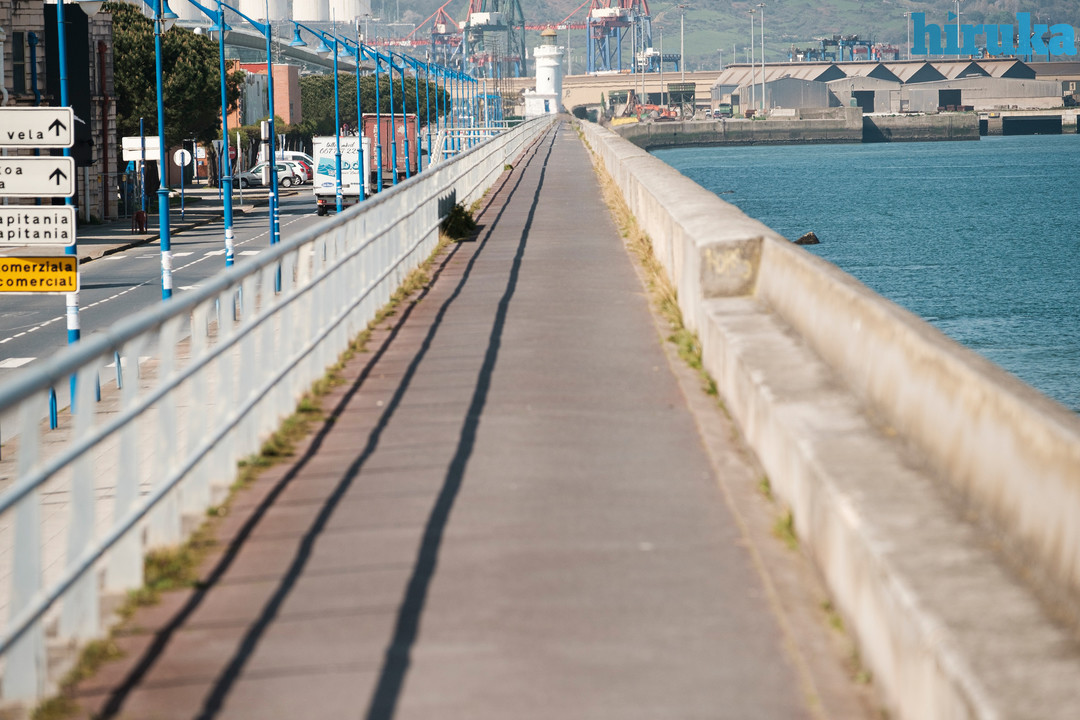 Orain arte pentsaezinak ziren irudiak utzi dizkigu koronabirusaren krisialdiak egunotan: pasealeku eta hondartza hutsak; erosketak egiteko ilara etengabeak; aurpegia erdizka estaltzen dituzten maskarak nonahi... Kaletik etxera; gizartearen bizitza balkoietan ikus daiteke orain, etxealditik ihes egiteko eguzkiaren izpiak harrapatu guran. Guztiak hemen